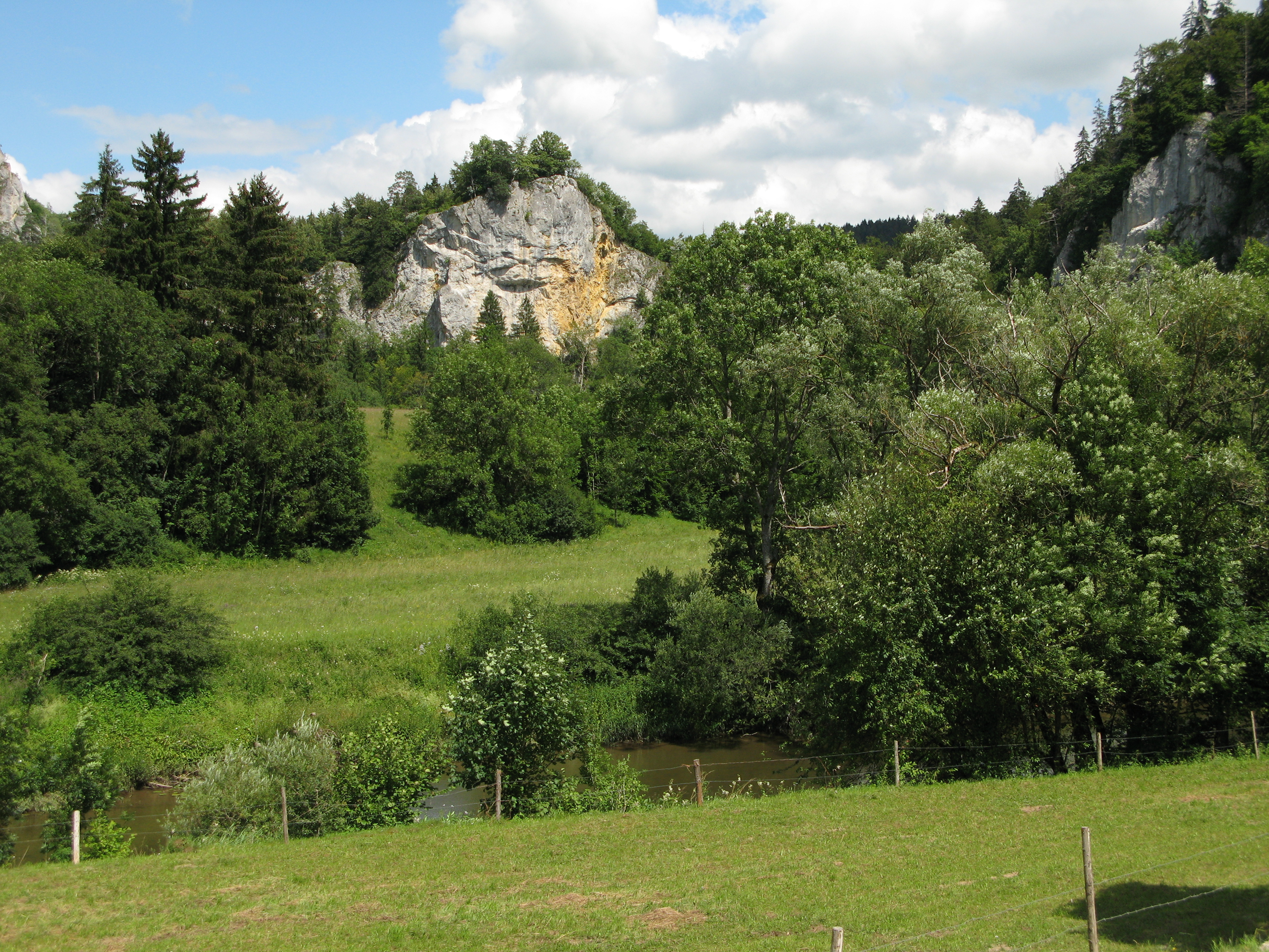 Die Donau im Donaudurchbruch in der Nähe des Wolfentals am Donauberglandweg auf der Schwäbischen Alb.